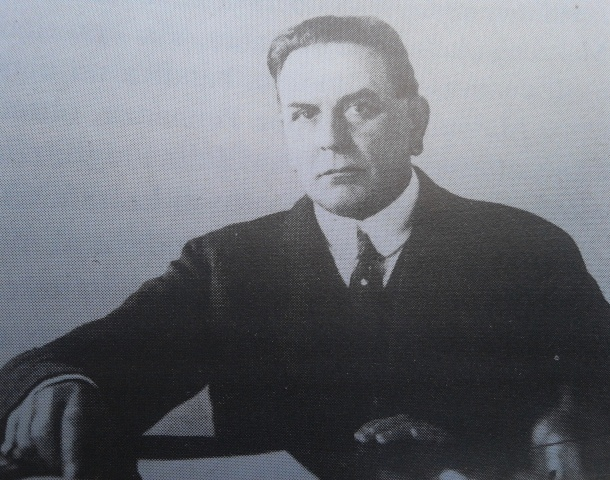 Camillo Corradini